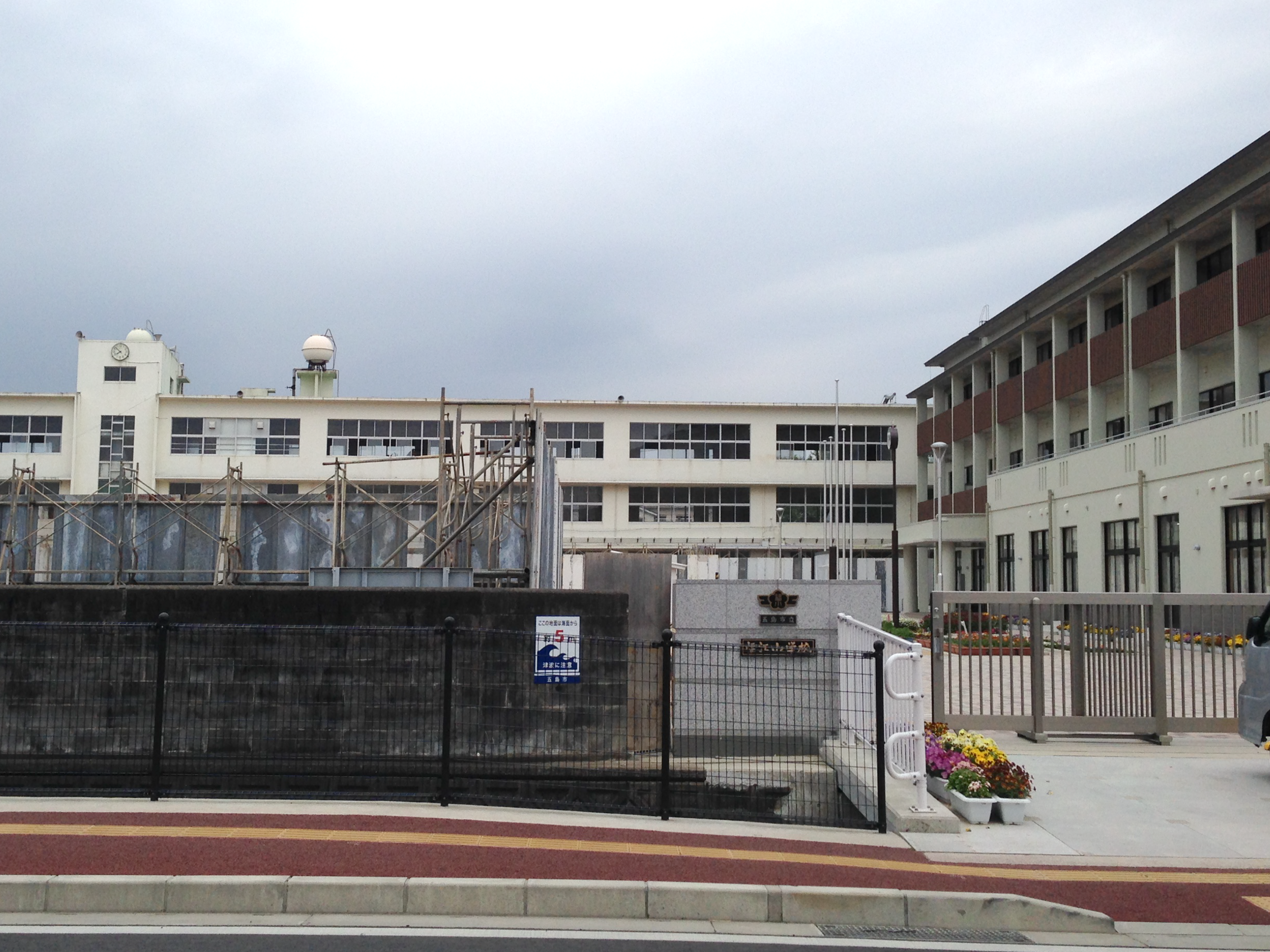 五島市立福江小学校-正門遠景